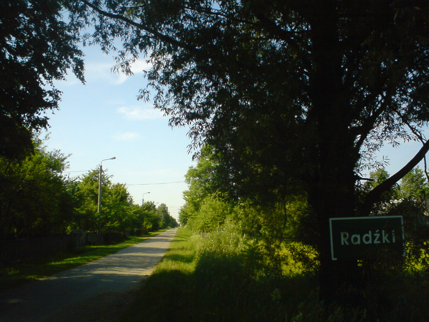 Radźki